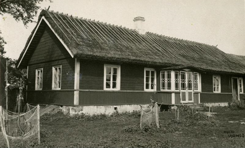 Жилой дом в деревне Хулло, остров Вормси, Эстония, 1930 год